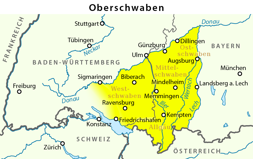 Lagekarte Oberschwaben